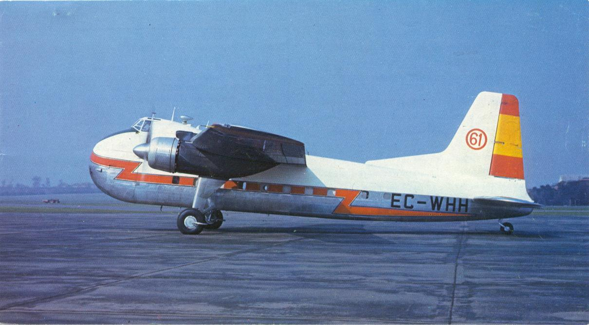 Bristol